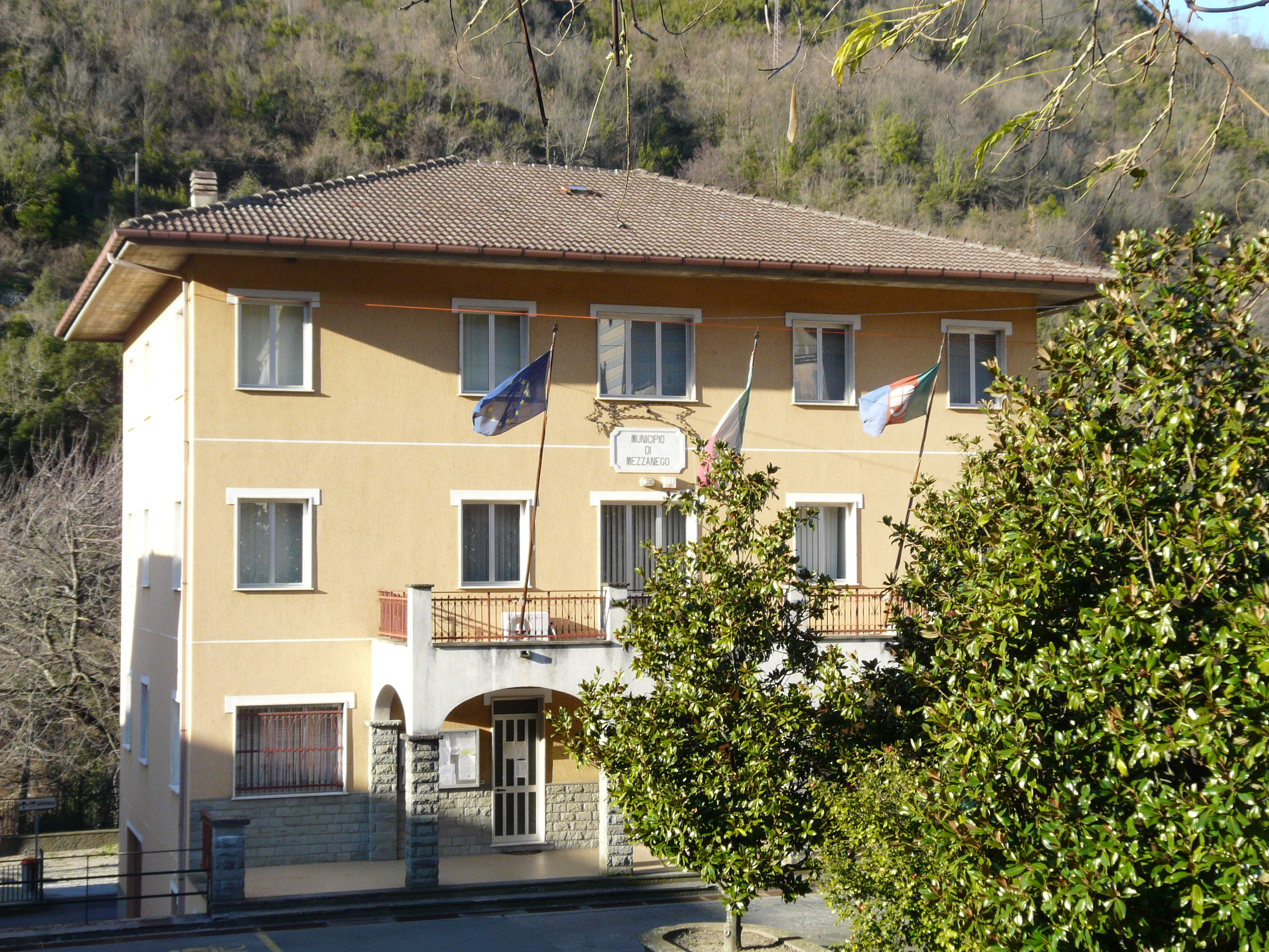 Comune di Mezzanego, Liguria, Italia